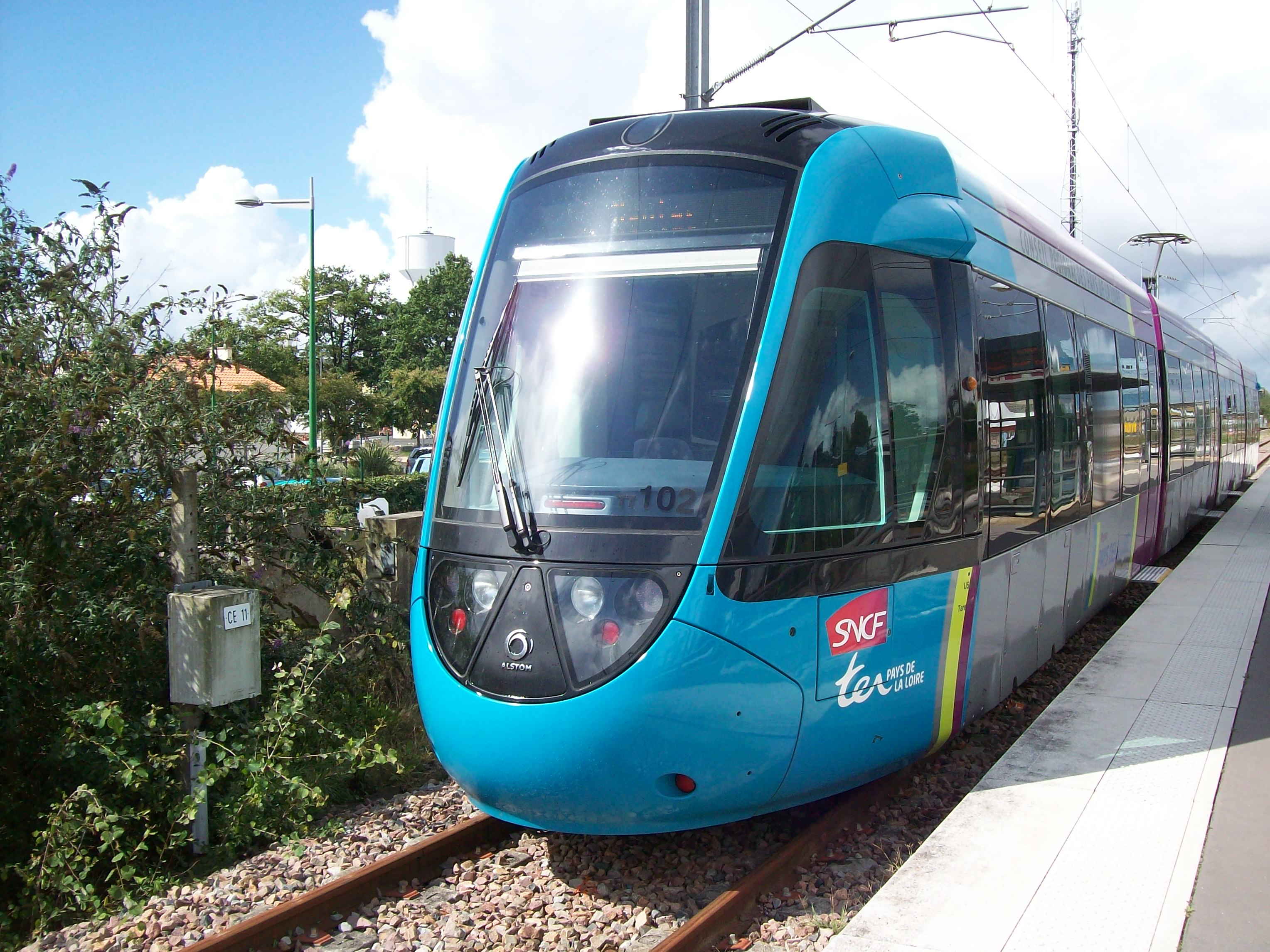 Une rame du Tram-Train de Nantes à quai en gare de Vertou